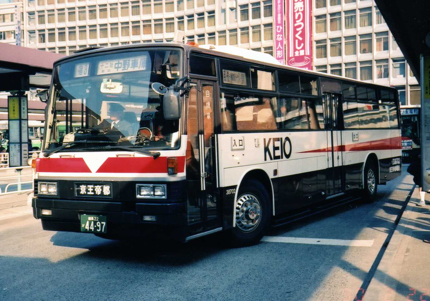 Keio Bus D38702 "One Roma" Mitsubishi P-MP618P改 at Shinjuku Sta.